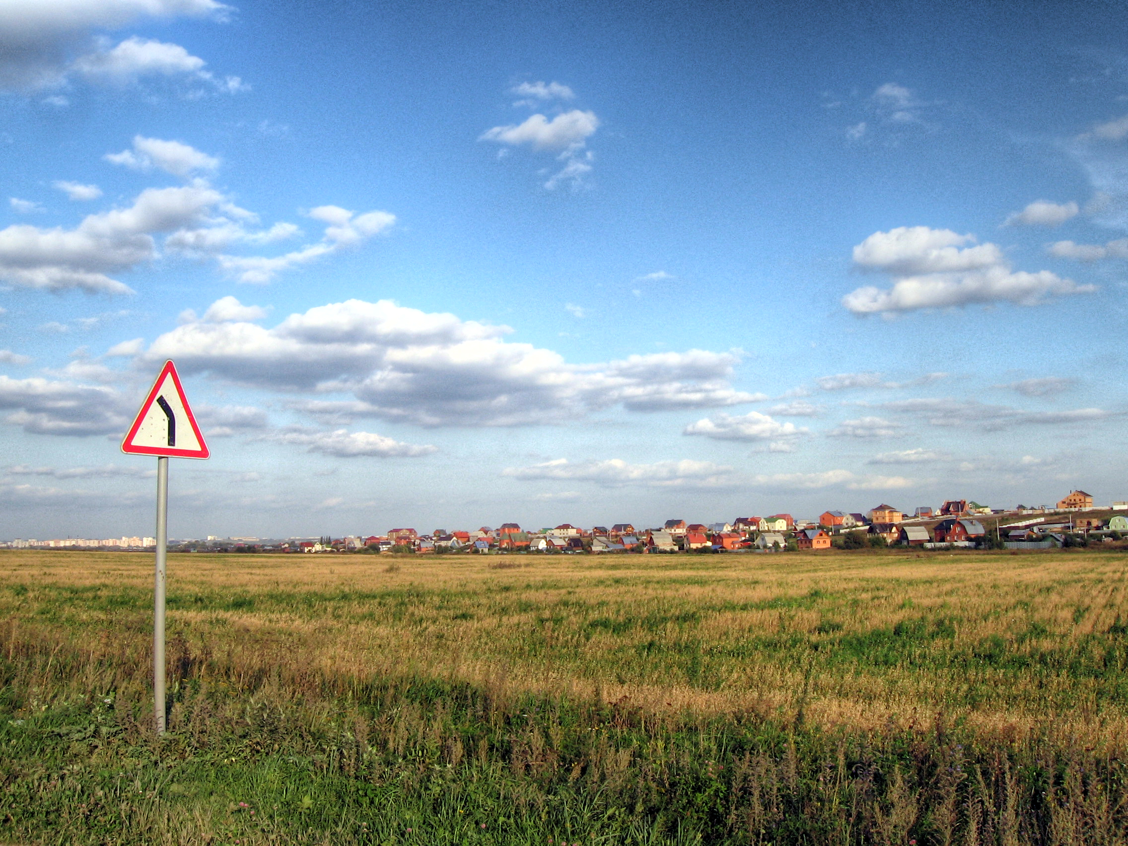 не далеко от аэродрома в мячково